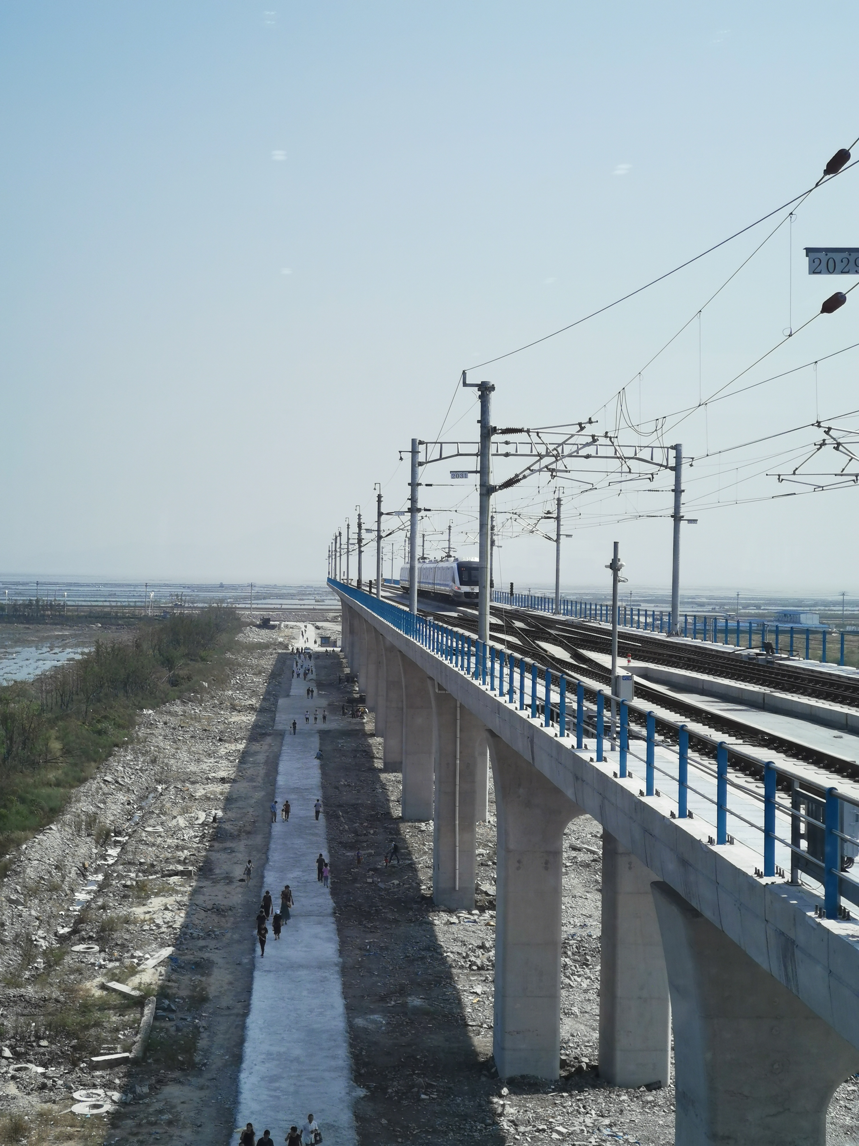 中文（中国大陆）: 温州市域铁路S1线双瓯大道站